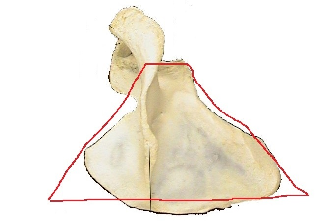 Монгол: Далан гэдэг үгний гарал үүслийн таамаг. Мал амьтны далны хэлбэр далангийн хэлбэртэй ижил, үгийн язгуур нь дал гэсэн баримтууд нь энэхүү таамаглалыг үүсгэж байна.